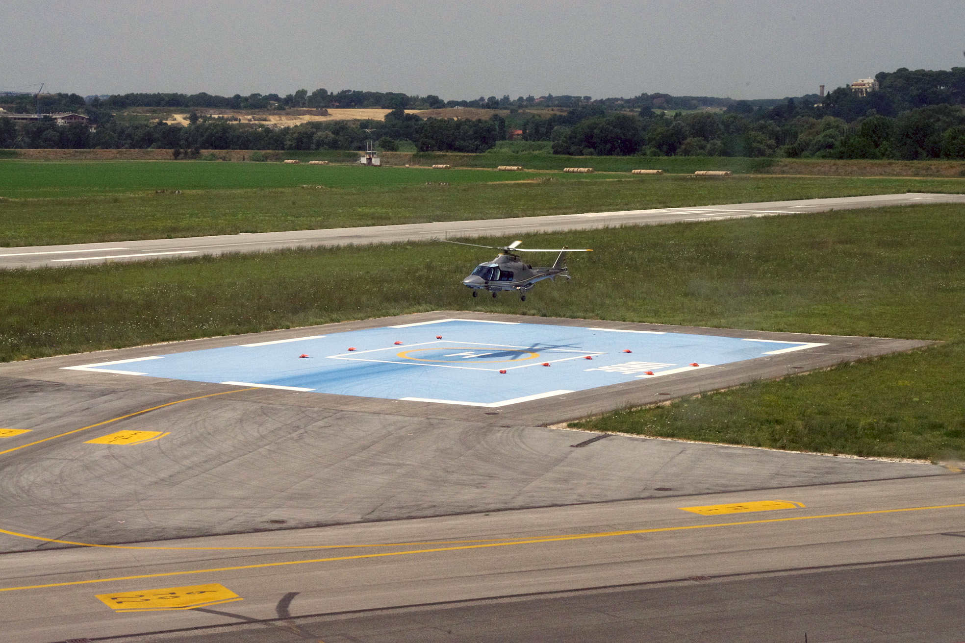 Aeroporto di Roma-Urbe, un Agusta A-109 in atterraggio.